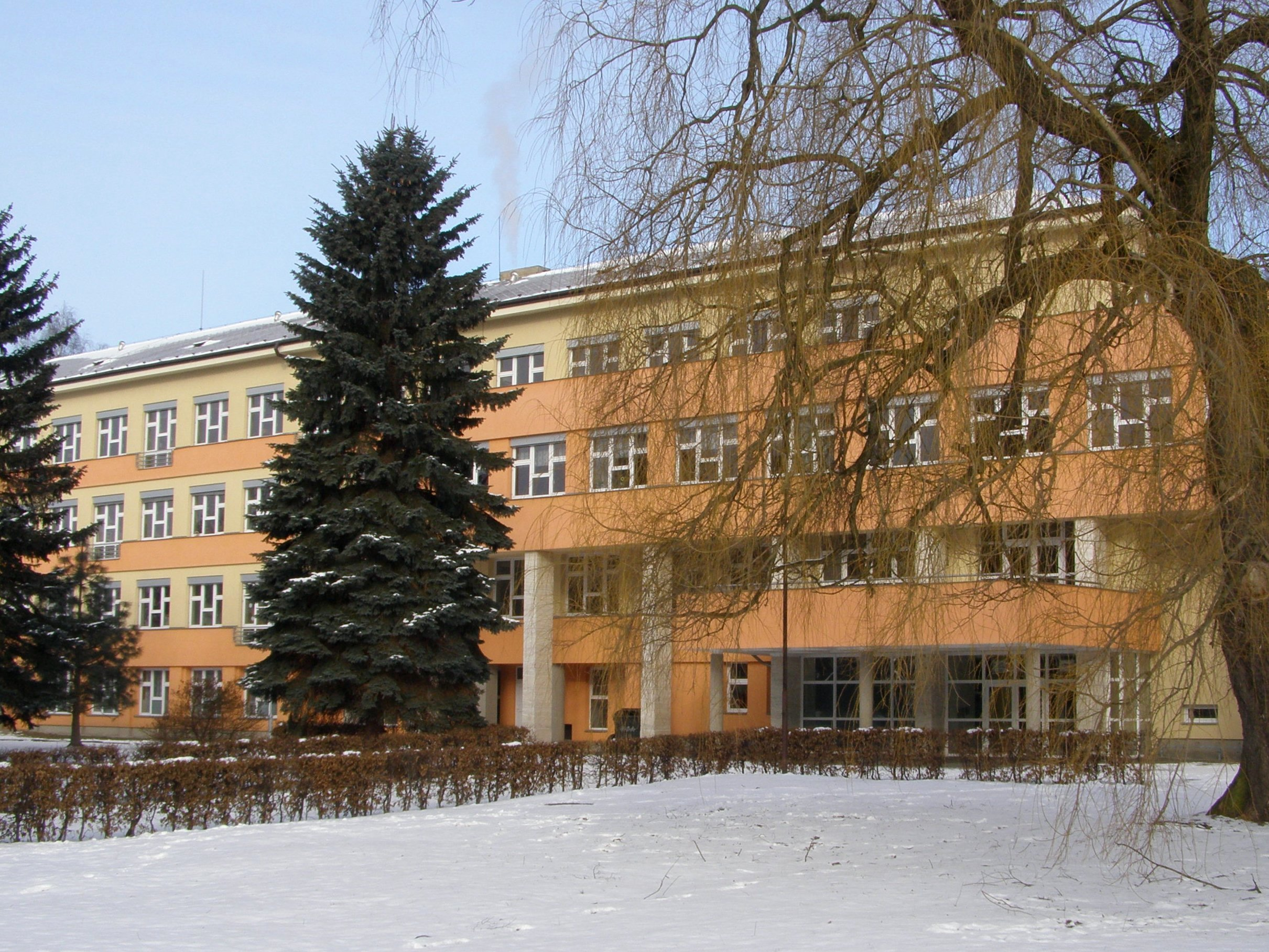 Frýdlant, ulice Purkyňova, základní škola